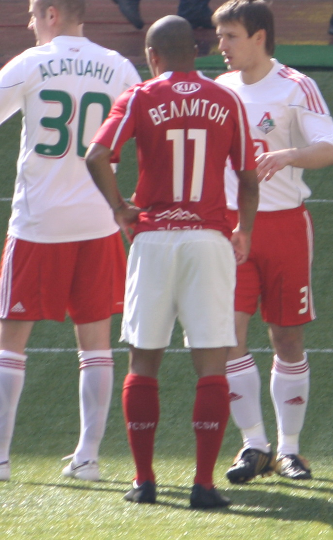 Welliton